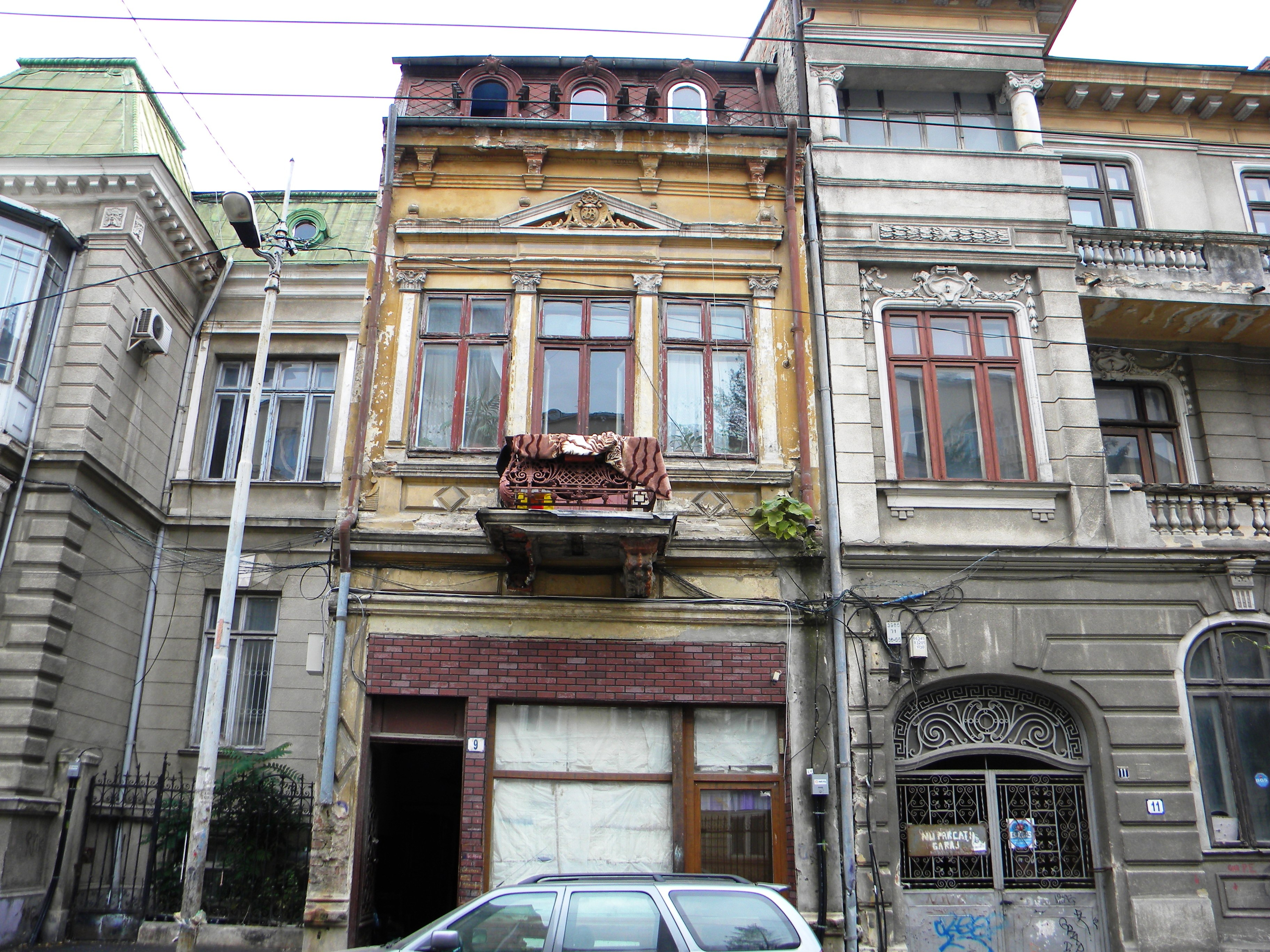 Bucuresti, Romania, Casa pe Calea Grivitei nr. 9, sect. 1